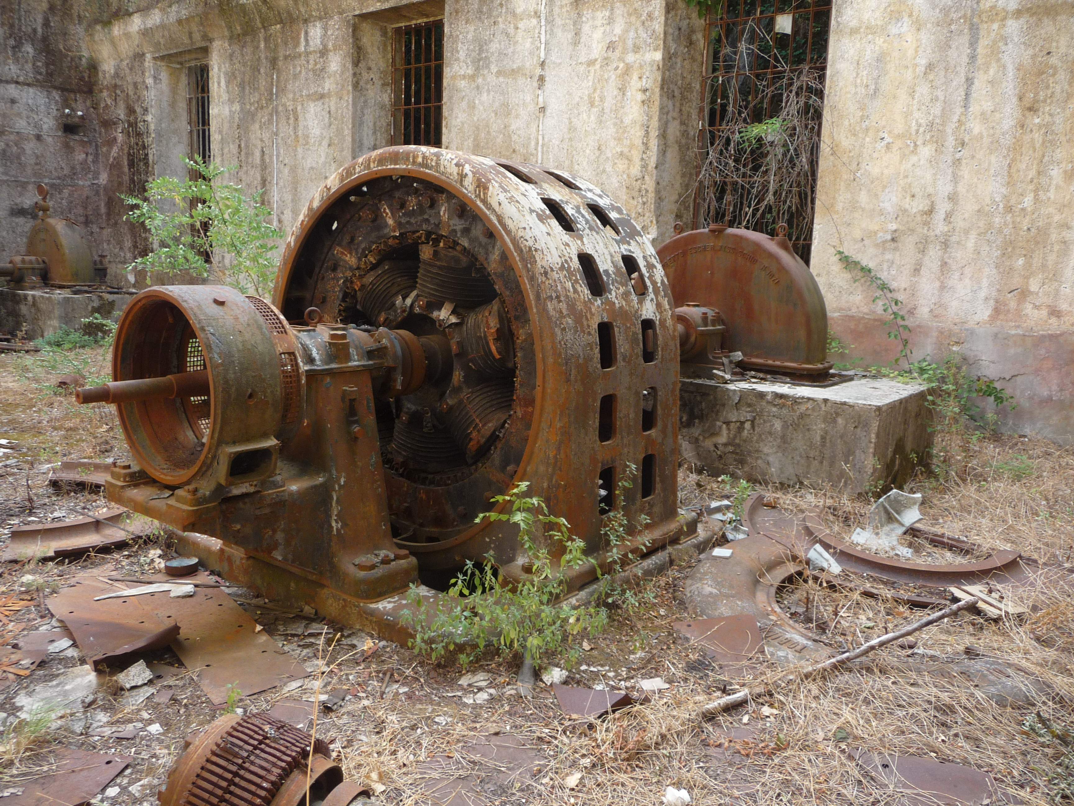 Turbina della centrale idroelettrica marmarico (2011)